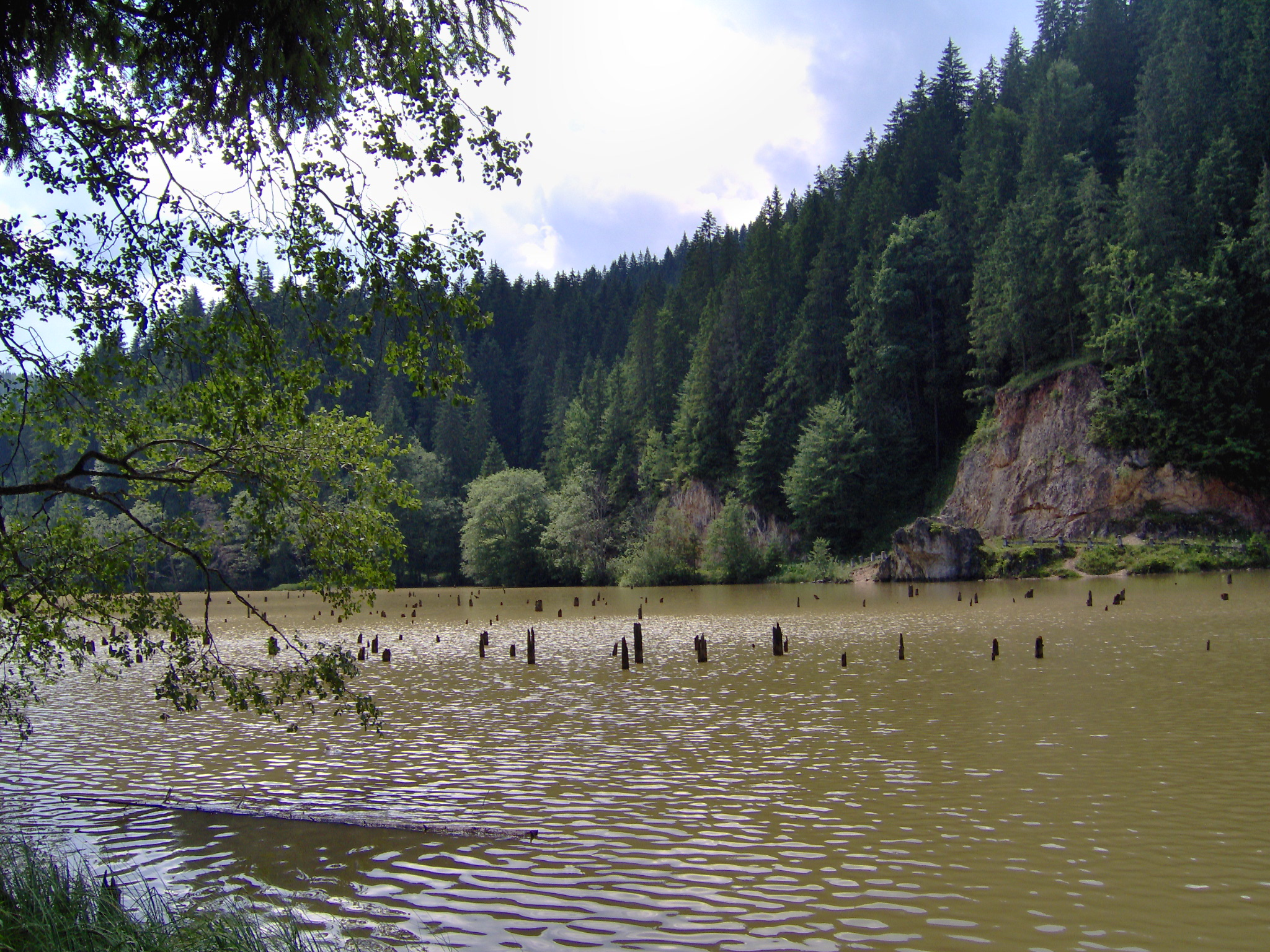 Lacul Roşu, 2006